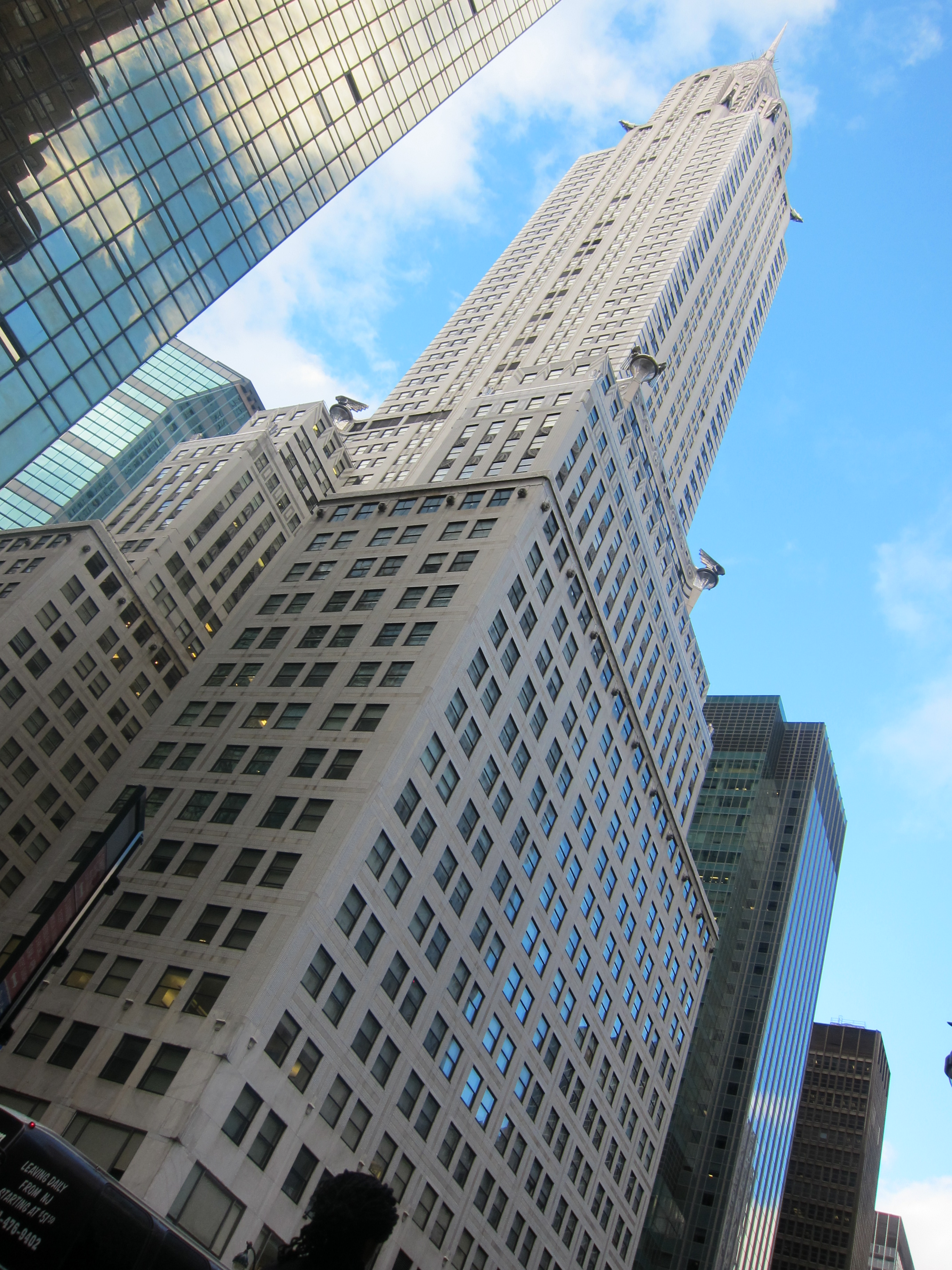 Крайслер-билдинг. Вид с East 42 Street.